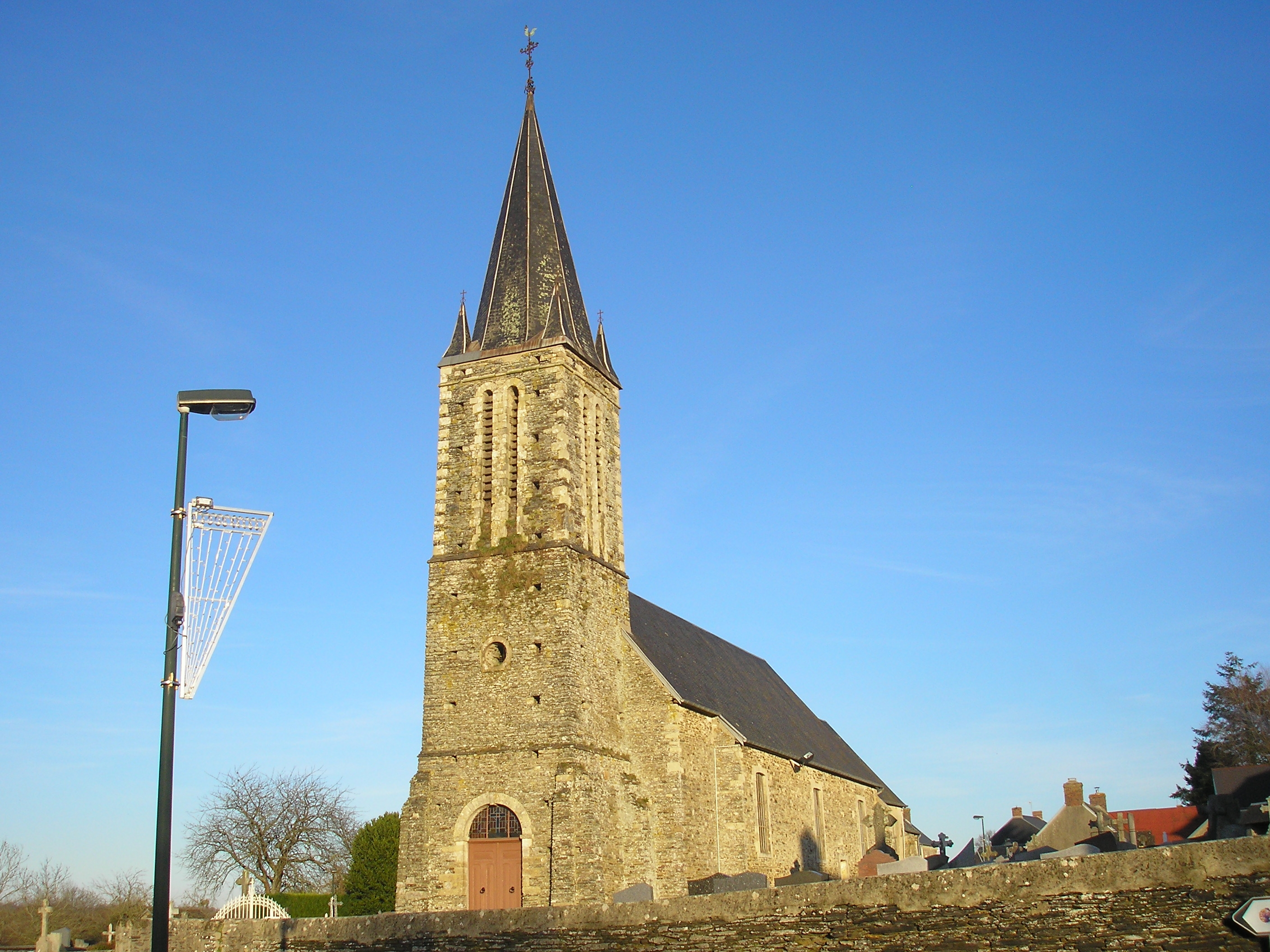 La Vacquerie (Normandie, France). L'église Saint-Sulpice.